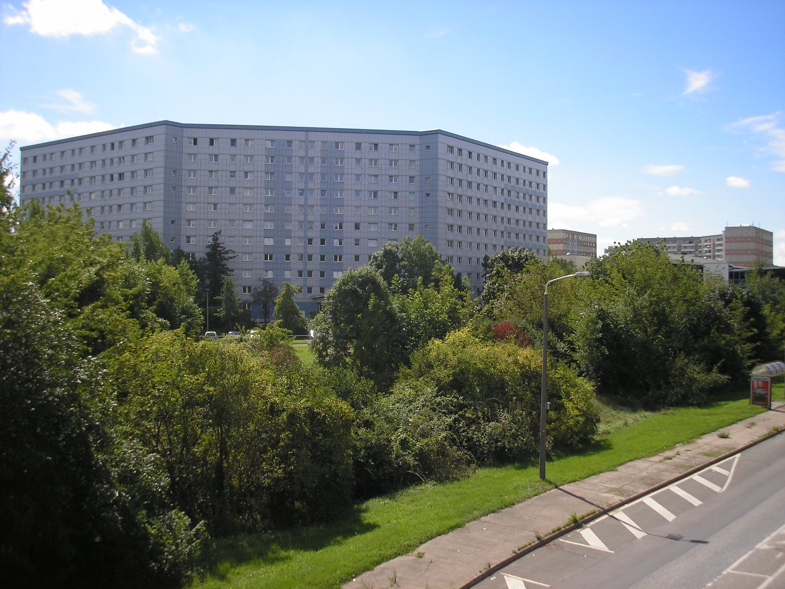 Plattenbauten im Erfurter Neubaugebiet Berliner Platz.